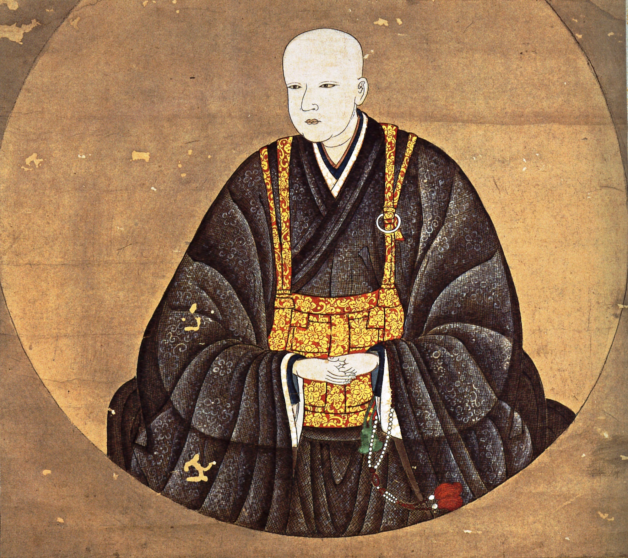 豊臣秀頼の娘・天秀尼 (1609 - 1645)の肖像画